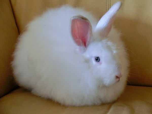 Weißes Satinangora